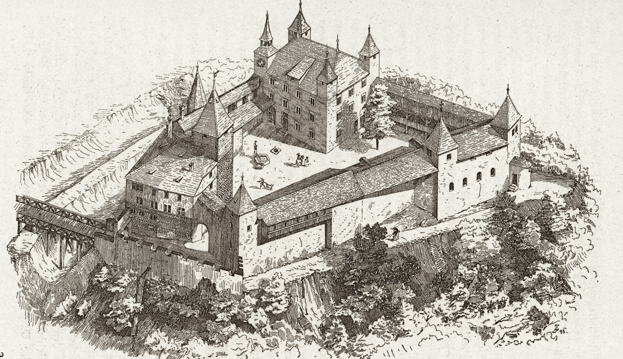 Schloss Kyburg zur Zeit der Landvögte